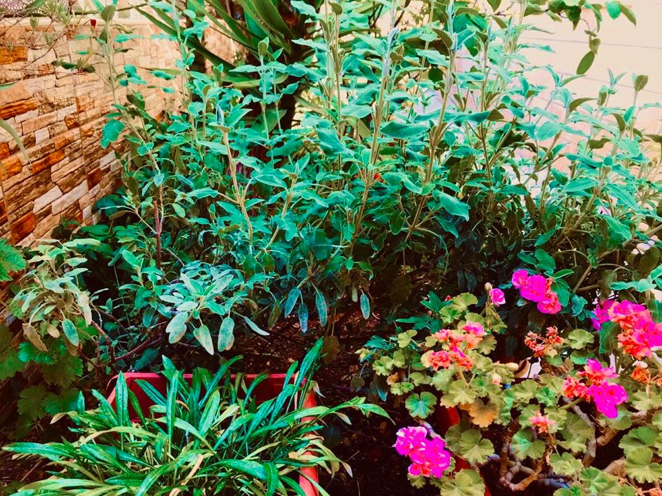 صورة لعشبة الميرامية وبعض الزهور المزروعة في أحد الحدائق المنزلية في الأردن